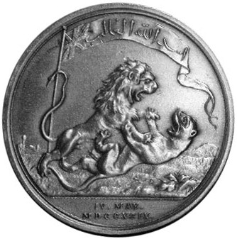 Seringapatam Medal 1808 obverse